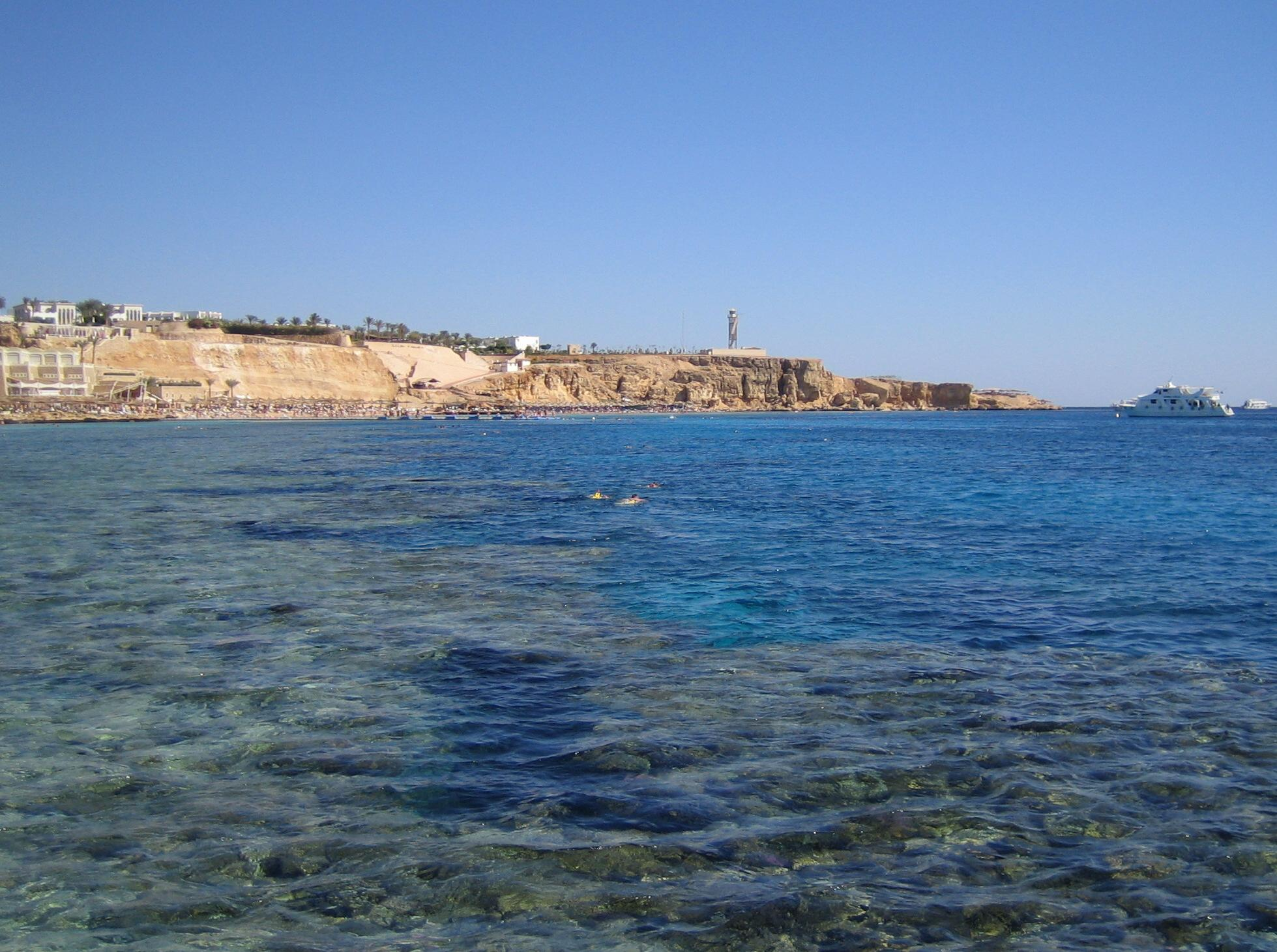 Plaża w Sharm